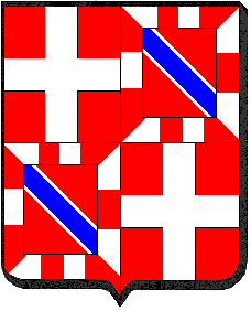 Wappen von Dieudonne de Gozon